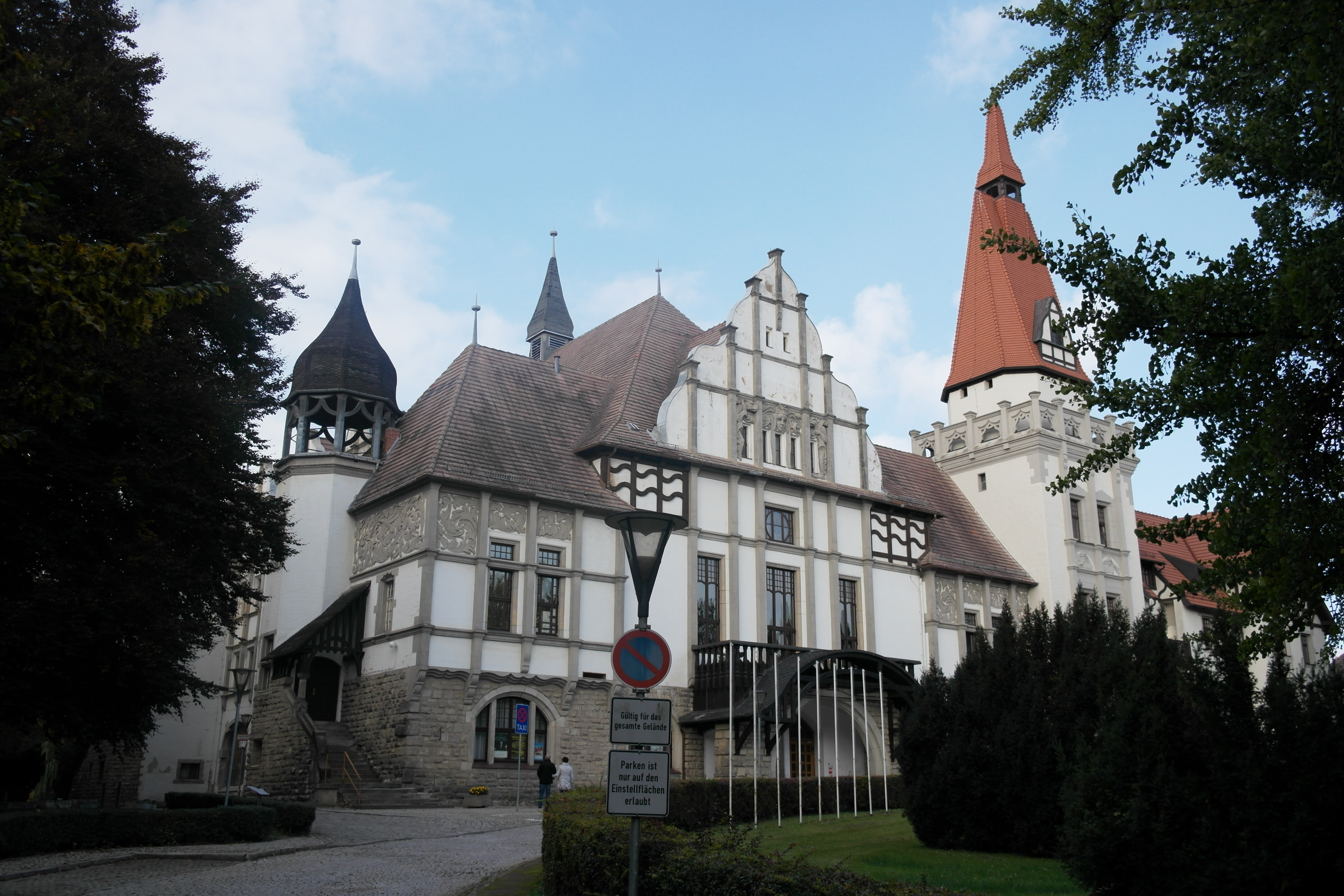 Bernburg, Kurhaus, Solbadstraße, Kulturdenkmal